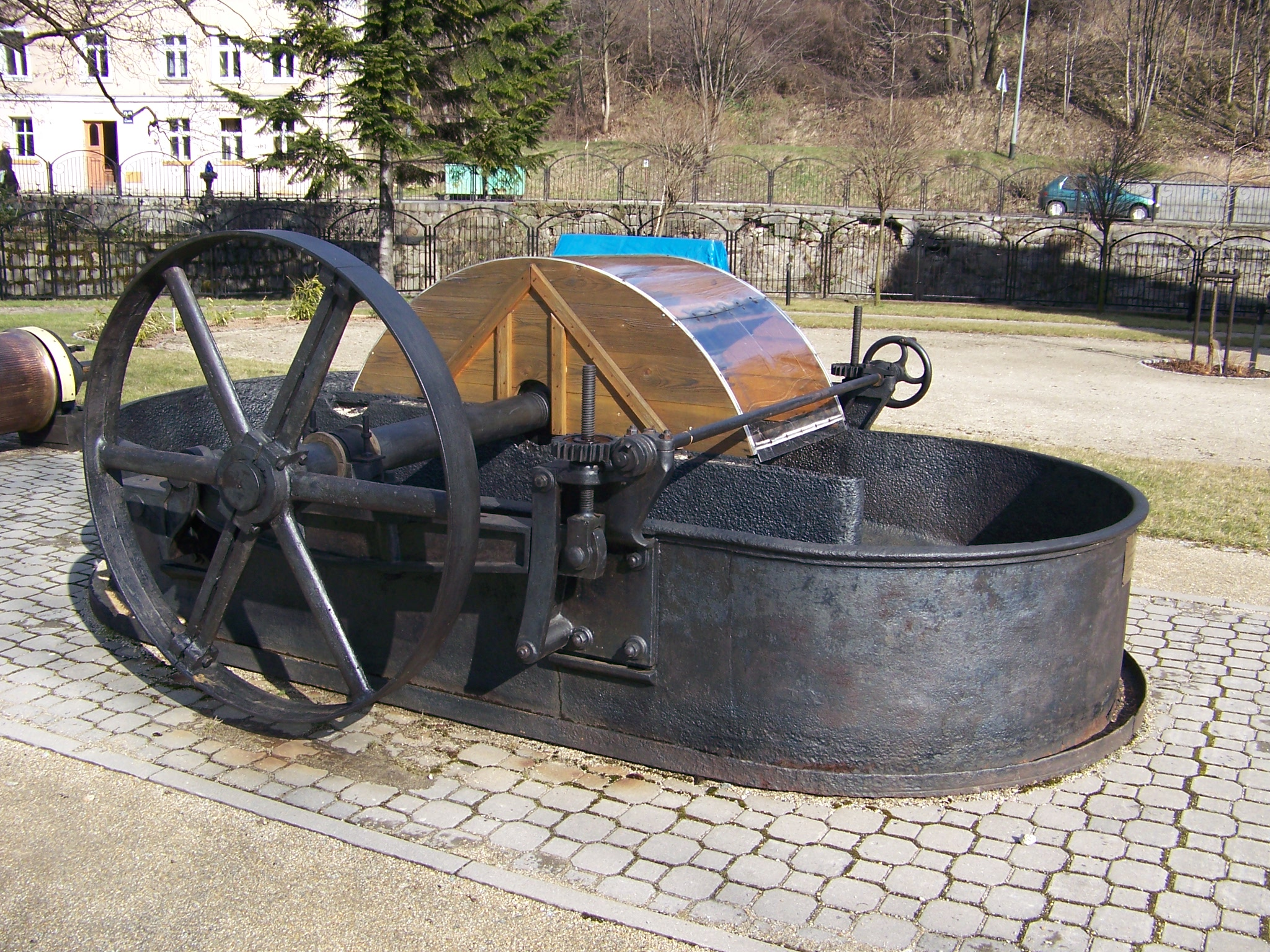 Holender, Muzeum Papiernictwa w Dusznikach Zdroju